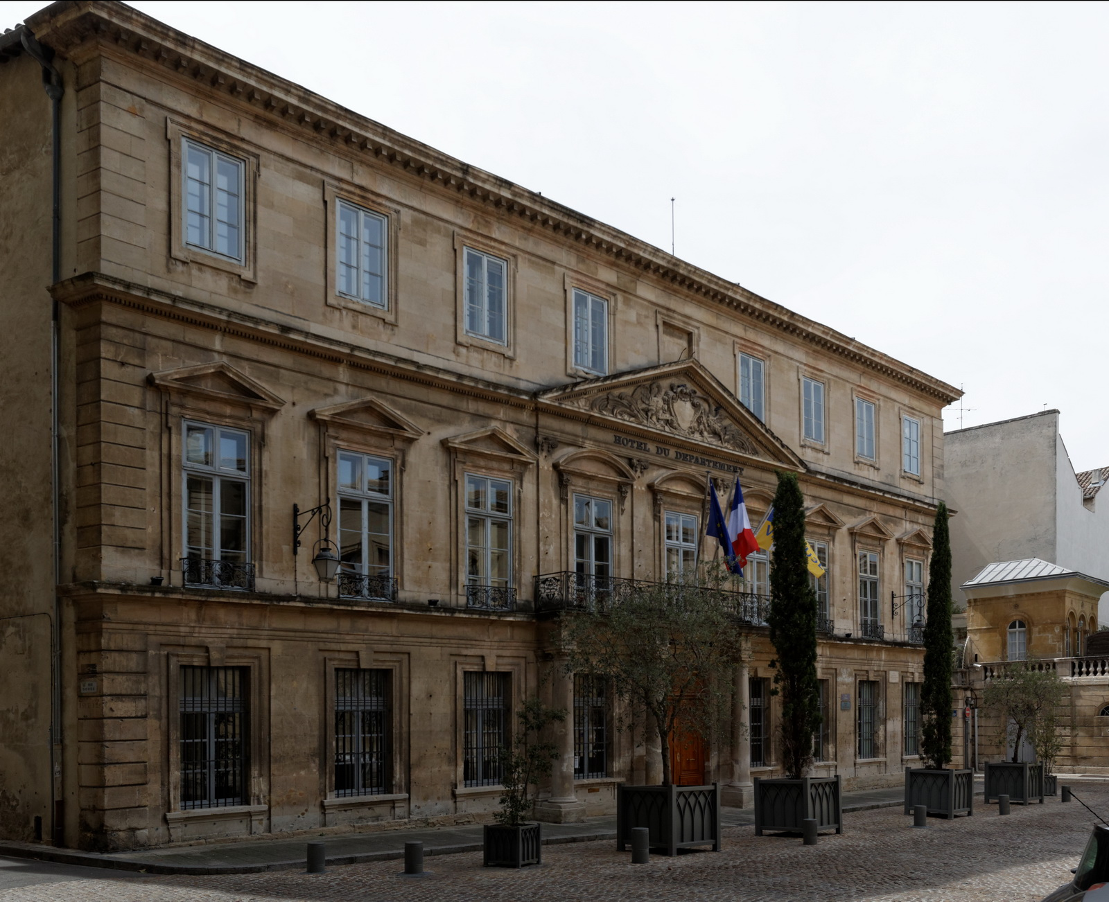 Hôtel Desmaretz de Montdevergues